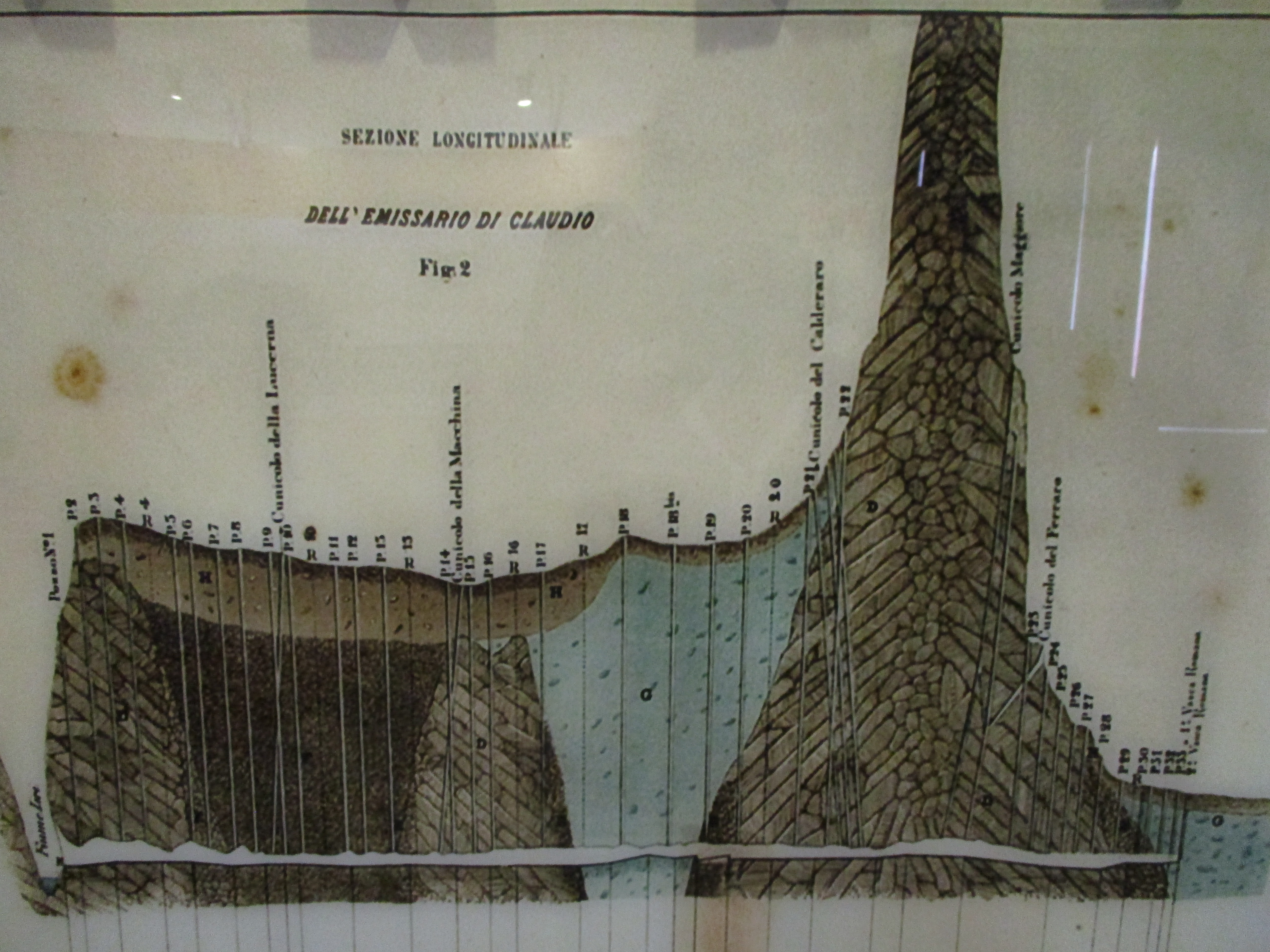 Schema dei Cunicoli di Claudio (Atlante 1876)